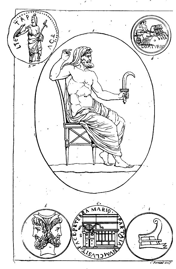 Cronos_armé_de_la_faucille_(harpè)_contre_son_père_et_divers_médaillons_pierre_gravée